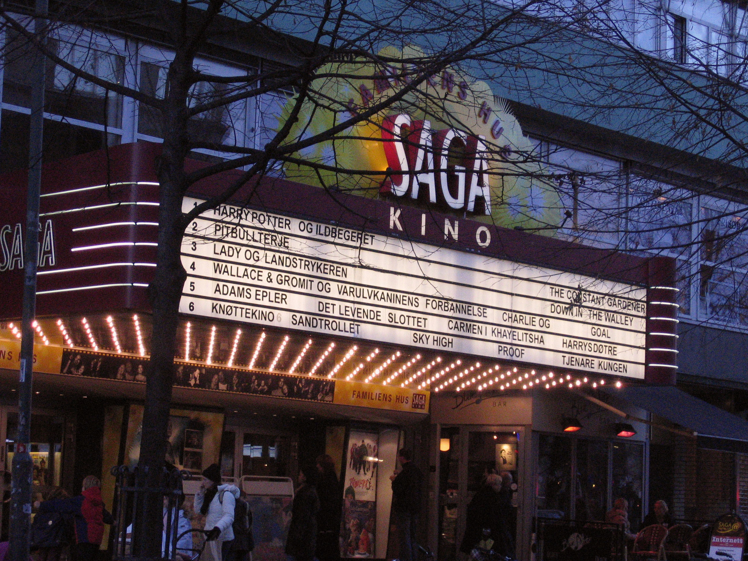 Saga kino (cinema), Oslo, Norway.